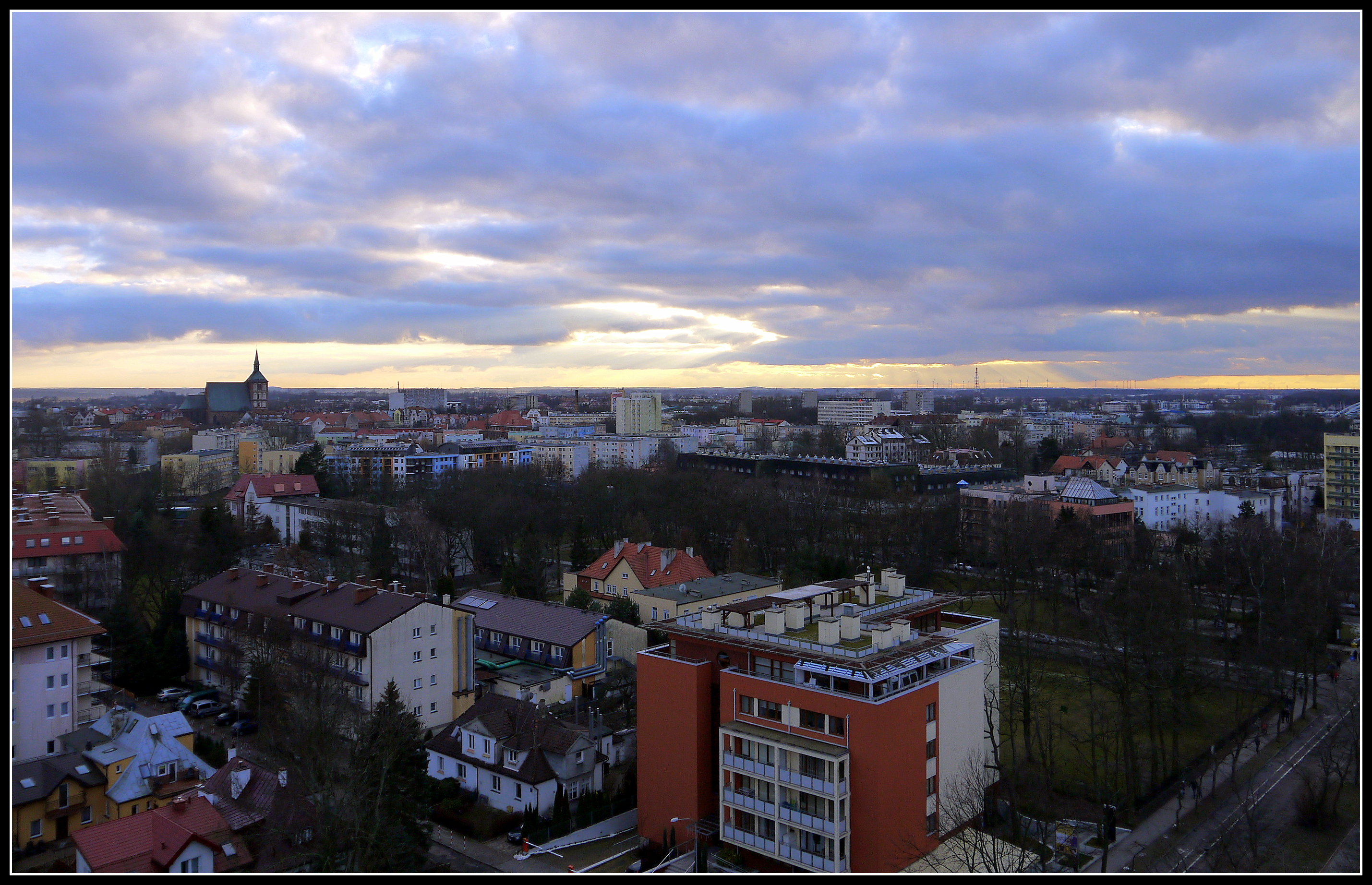 Kołobrzeg widok ogólny